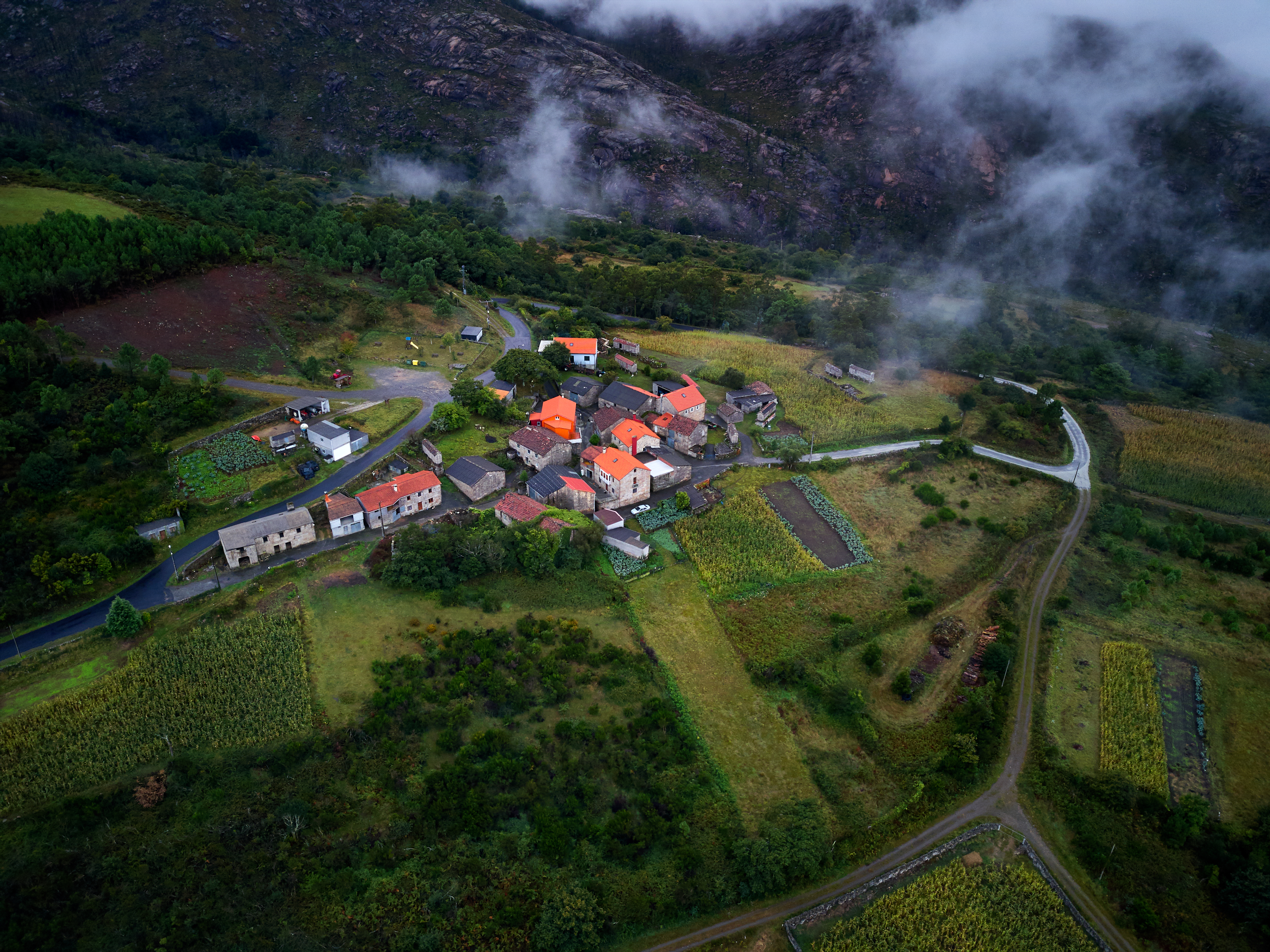 Vista aérea do Fieiro, Arcos, Mazaricos.